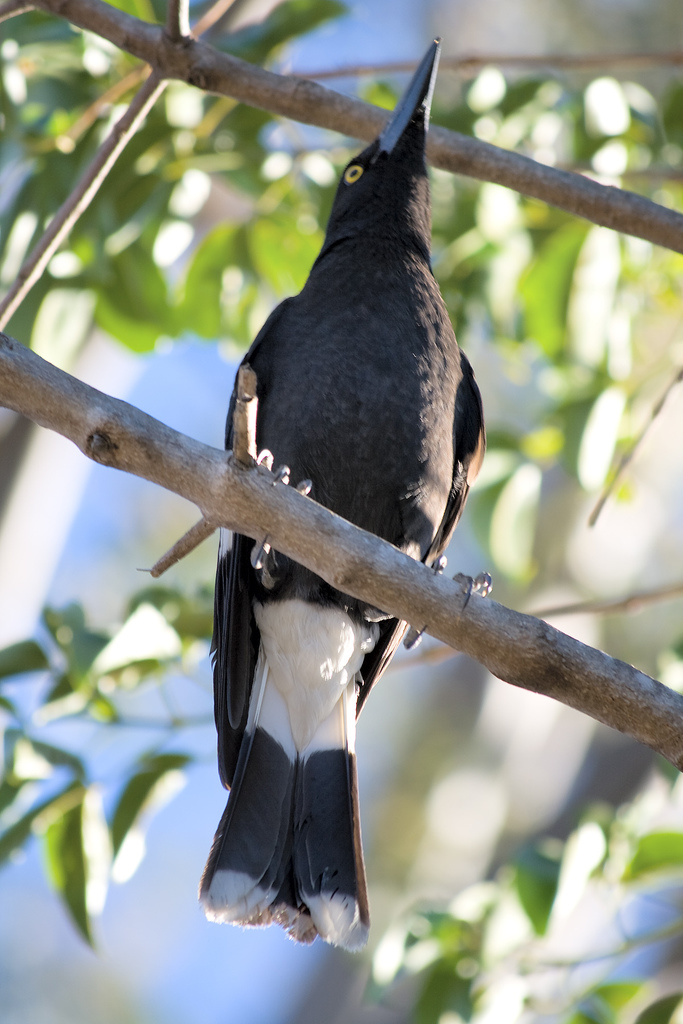 Strepera graculina ;grand réveilleur